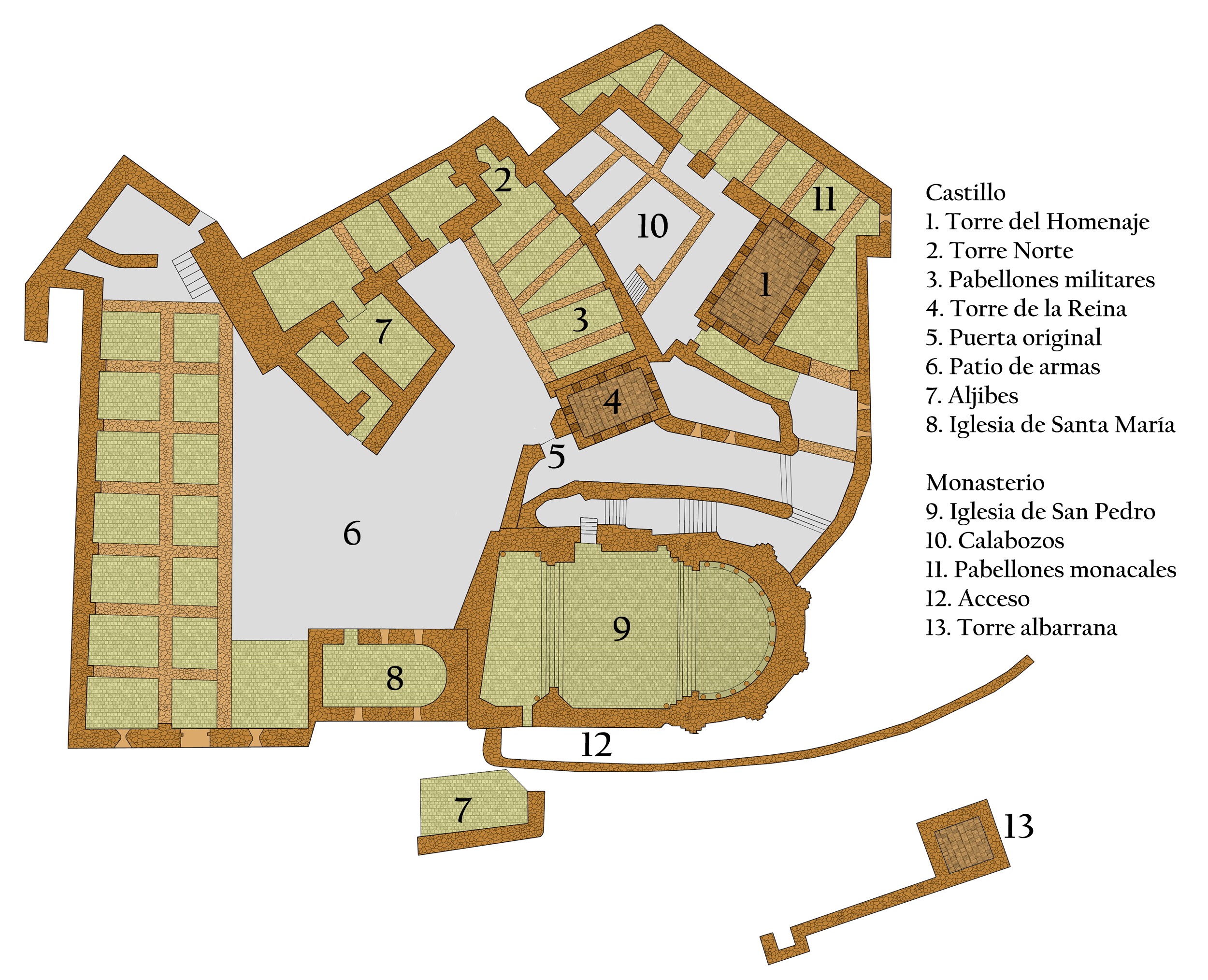 Plano del Castillo de Loarre, provincia de Huesca España. Se muestra la planta general del edificio.